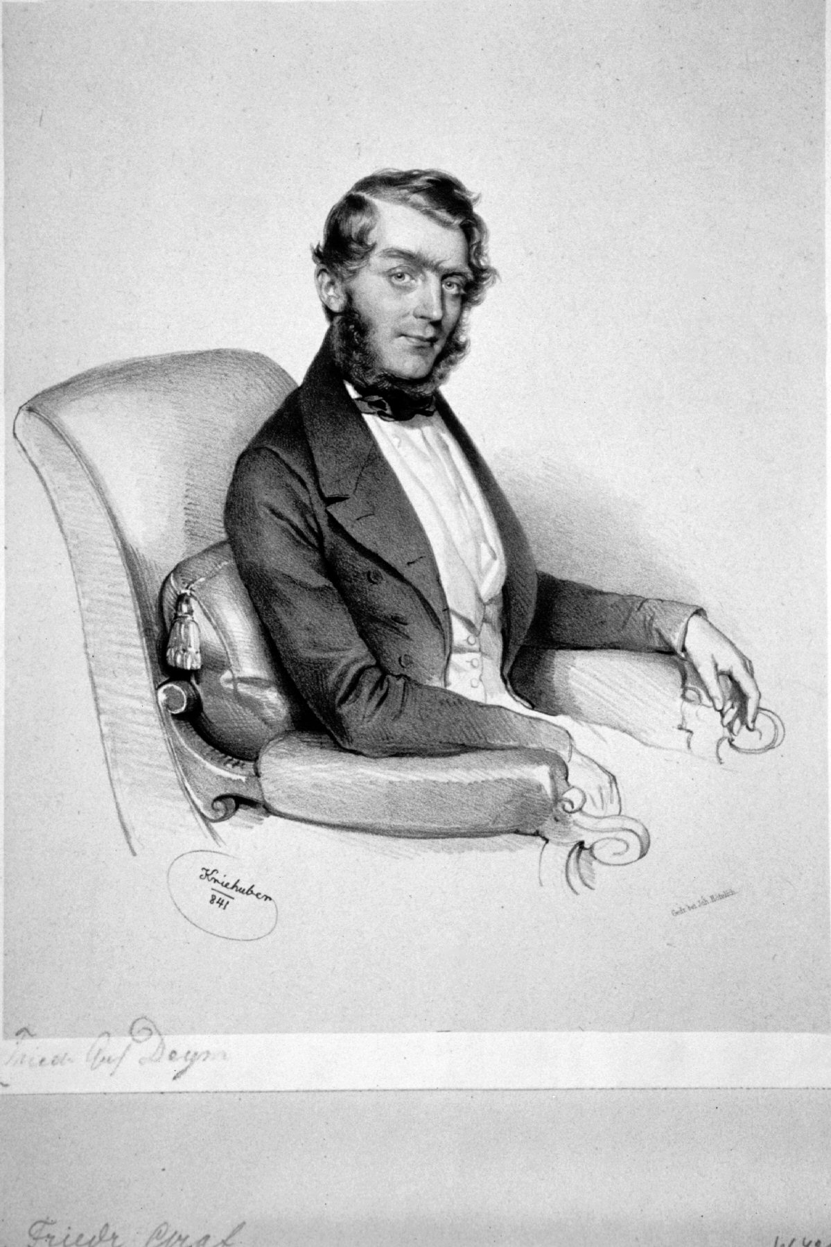 Friedrich von Deym (1801-1853), Schriftsteller, Mitglied der Frankfurter Nationalversammlung